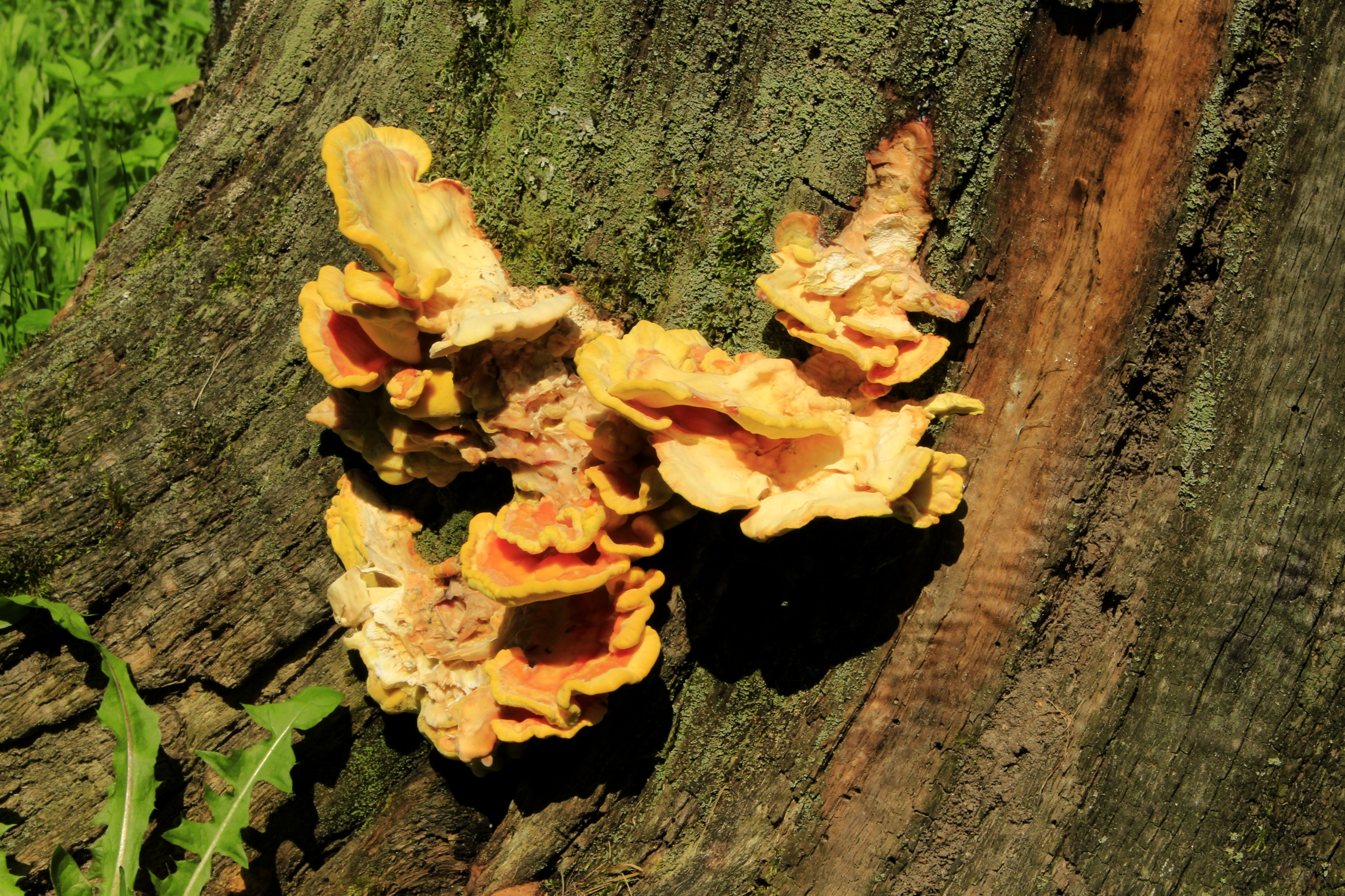 Geltonoji kempinė Ąžuolyne.